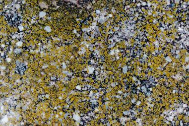 Caloplaca feracissima